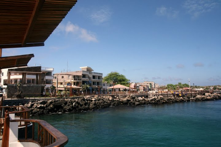 Puerto Baquerizo, Isla de San Cristóbal, Galapagos, Ecuador